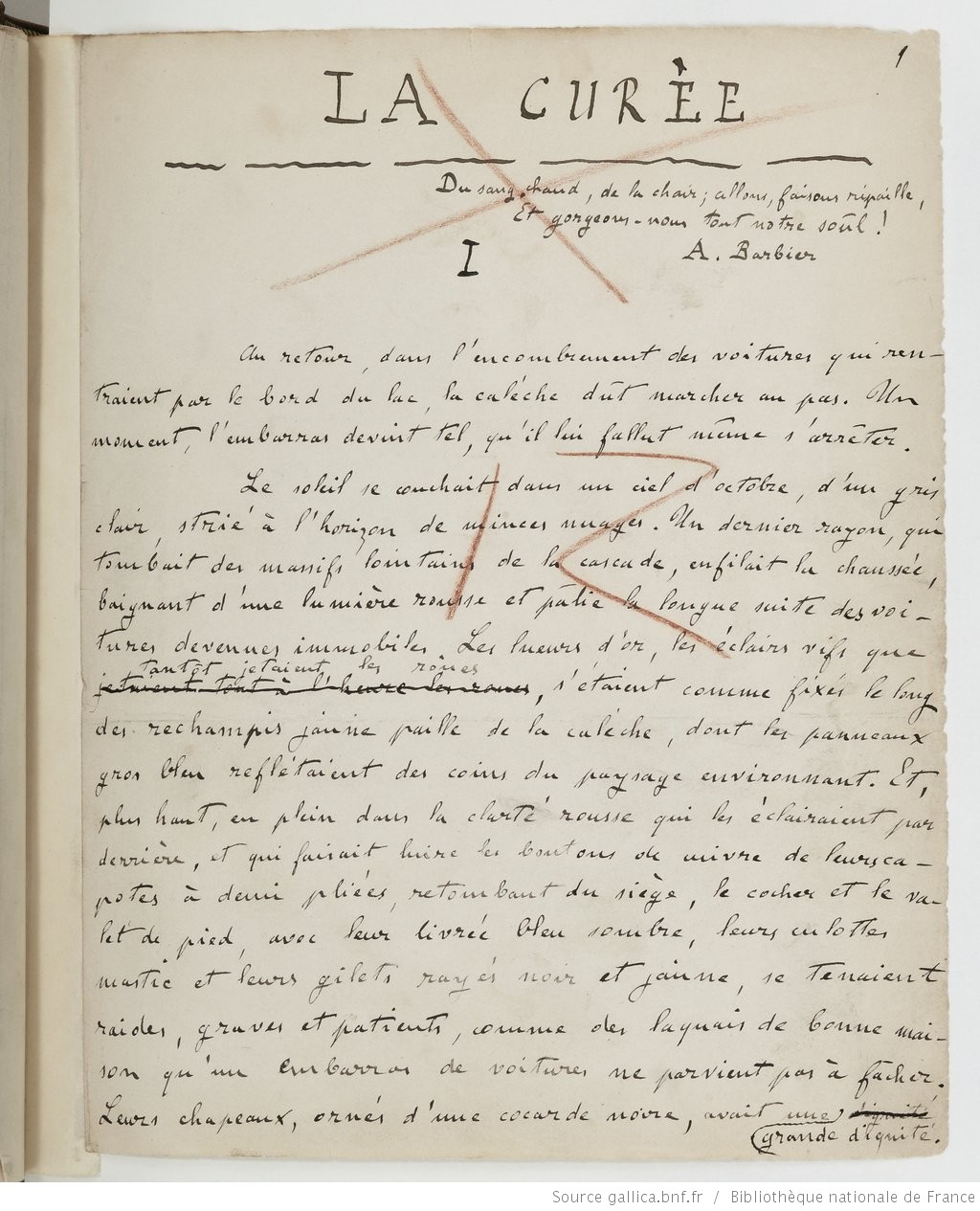 Erste Seite von Émile Zolas als Druckvorlage verwendeten Handschrift des Romans La Curée (dt. "Die Beute" oder "Die Treibjagd").